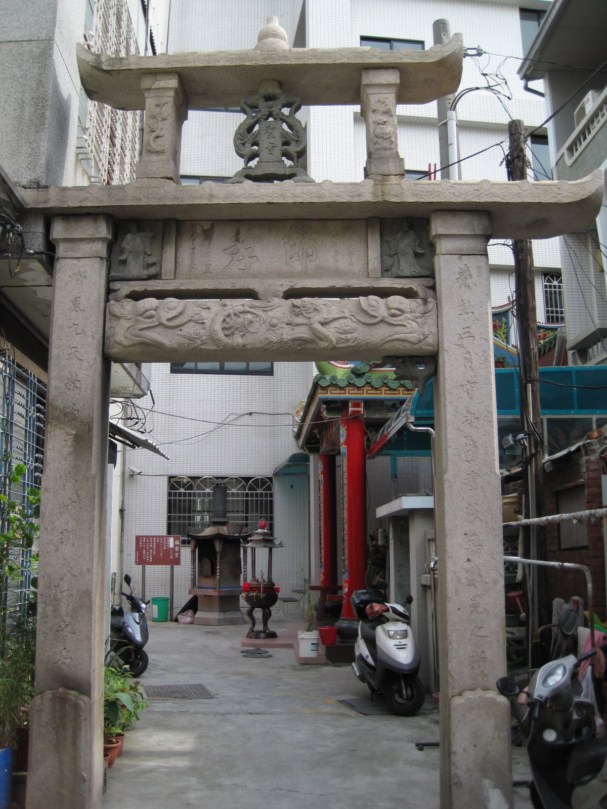 臺南市蕭氏節孝坊的北面